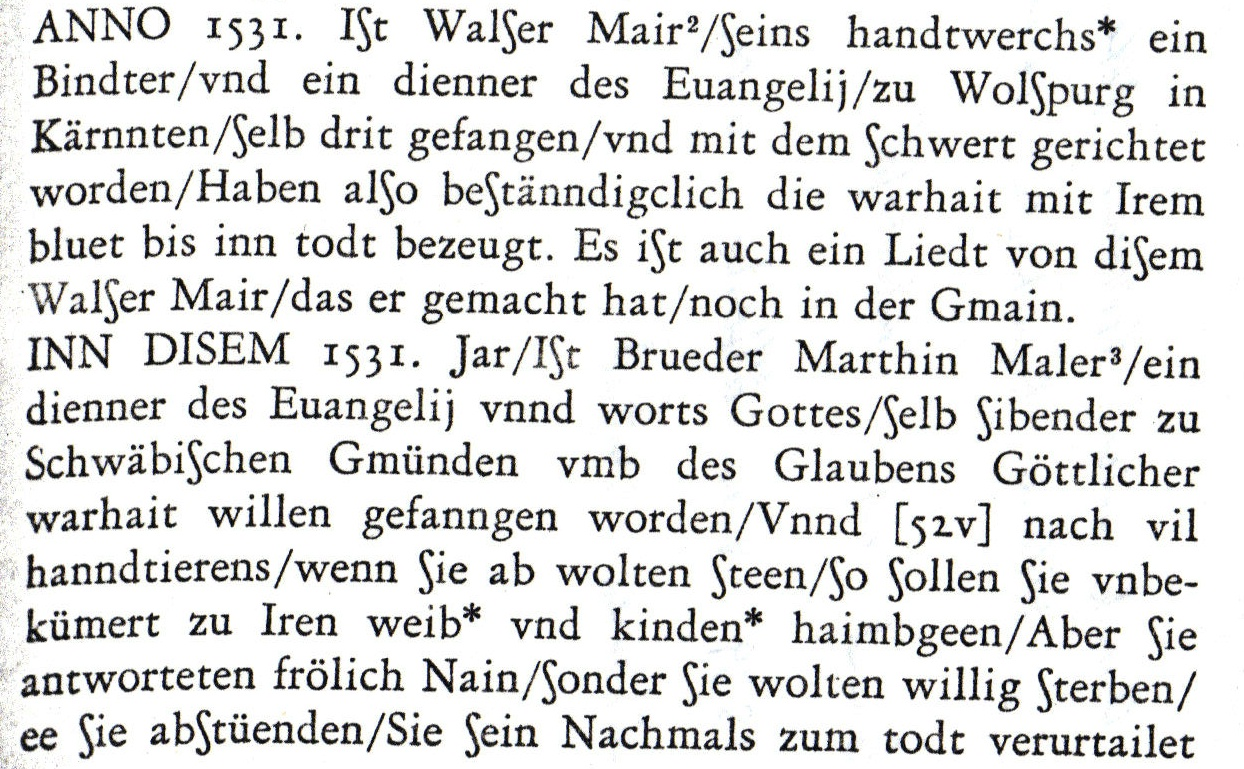 Täufergericht Schwäbisch Gmünd 1529 nach der ältesten Chronik der Hutterischen Brüder